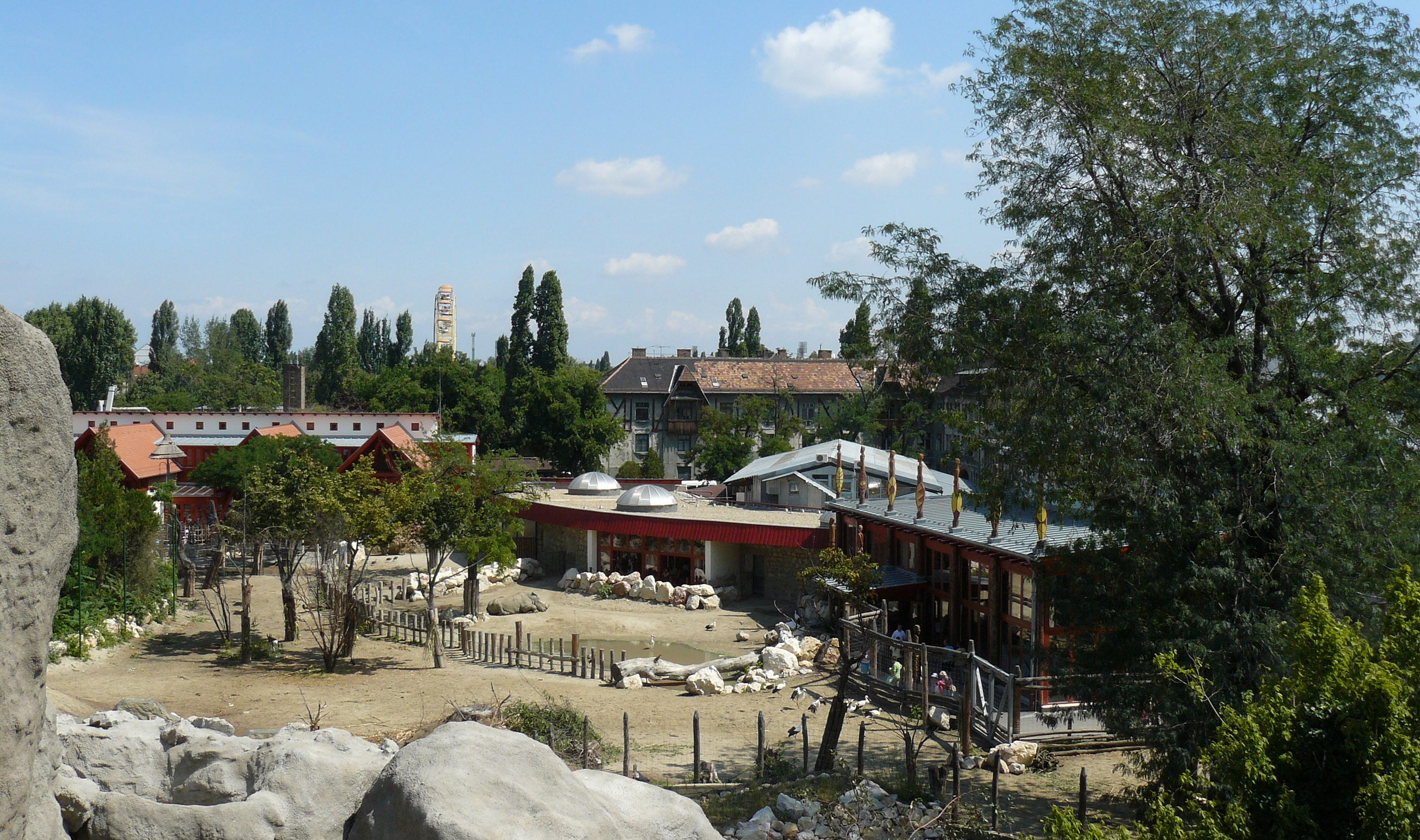 A budapesti Fővárosi Állatkert szavannakifutójának felülnézeti képe a Nagyszikláról